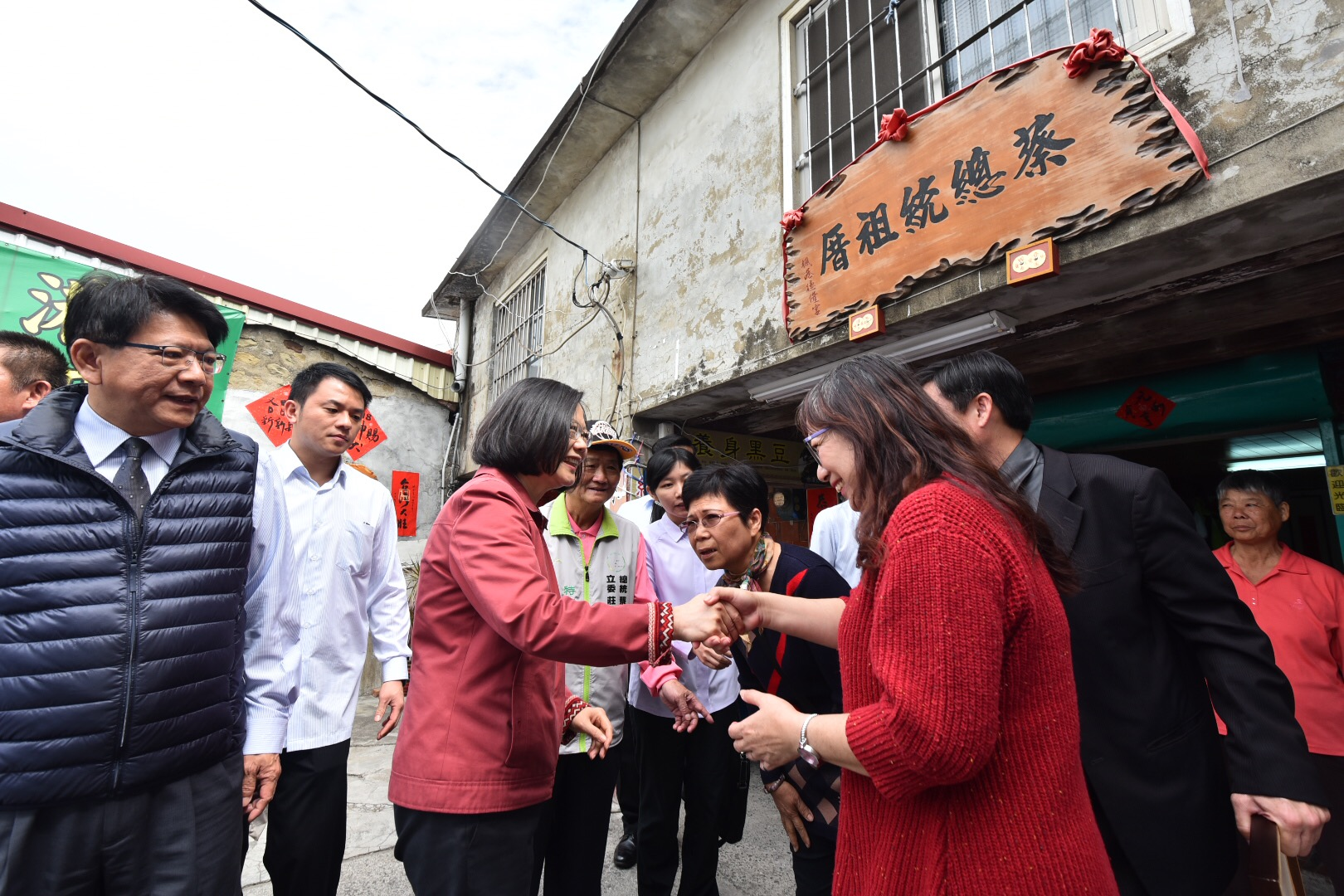 02.24 總統前往屏東枋山鄉楓港德隆宮發放福袋，也藉此機會回到古厝與鄰里村民寒暄問好